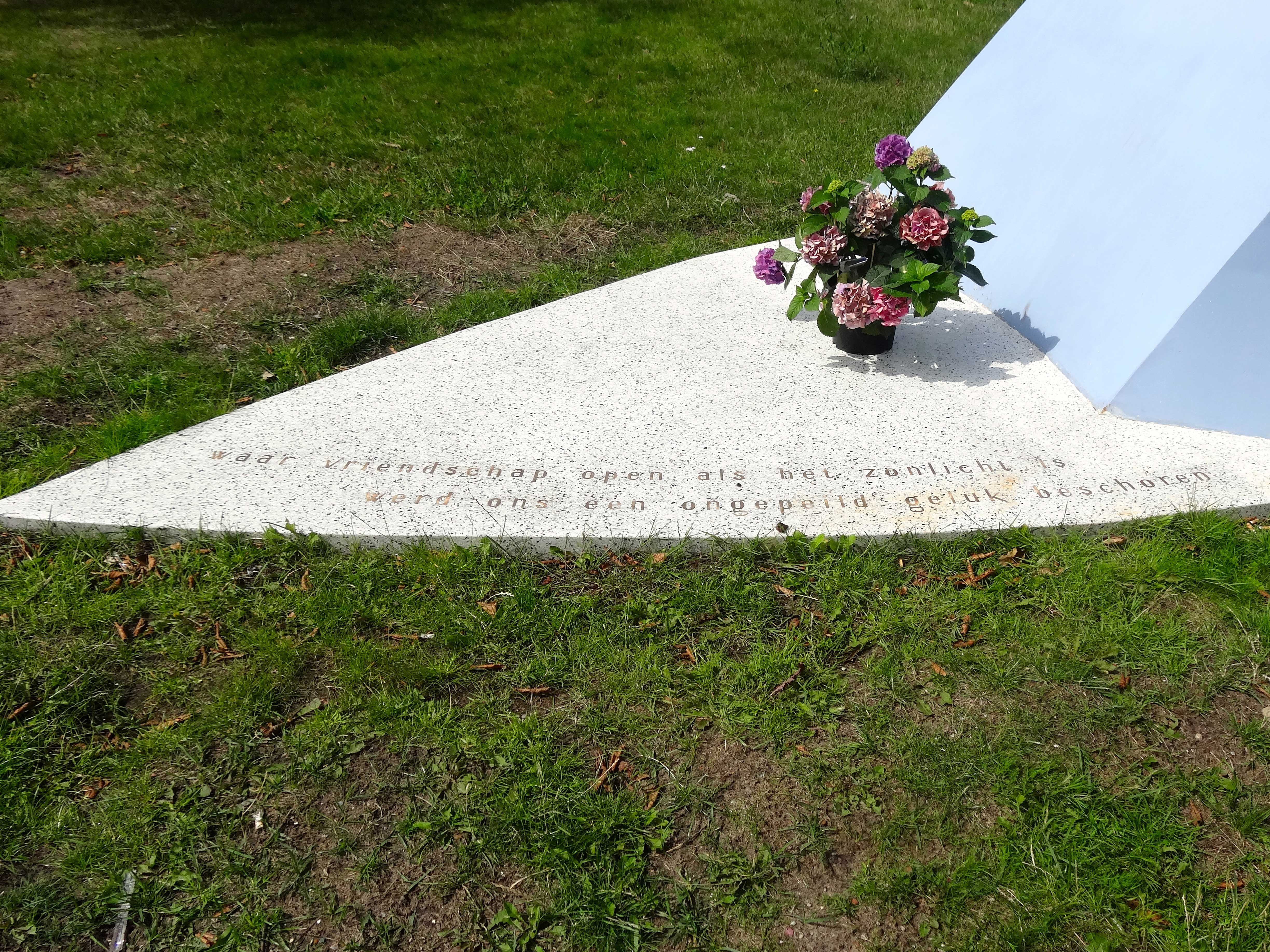 Homomonument gemaakt door Theo ten Have, detail met tekst: "waar vriendschap open als het zonlicht is werd ons een ongepeild geluk beschoren"